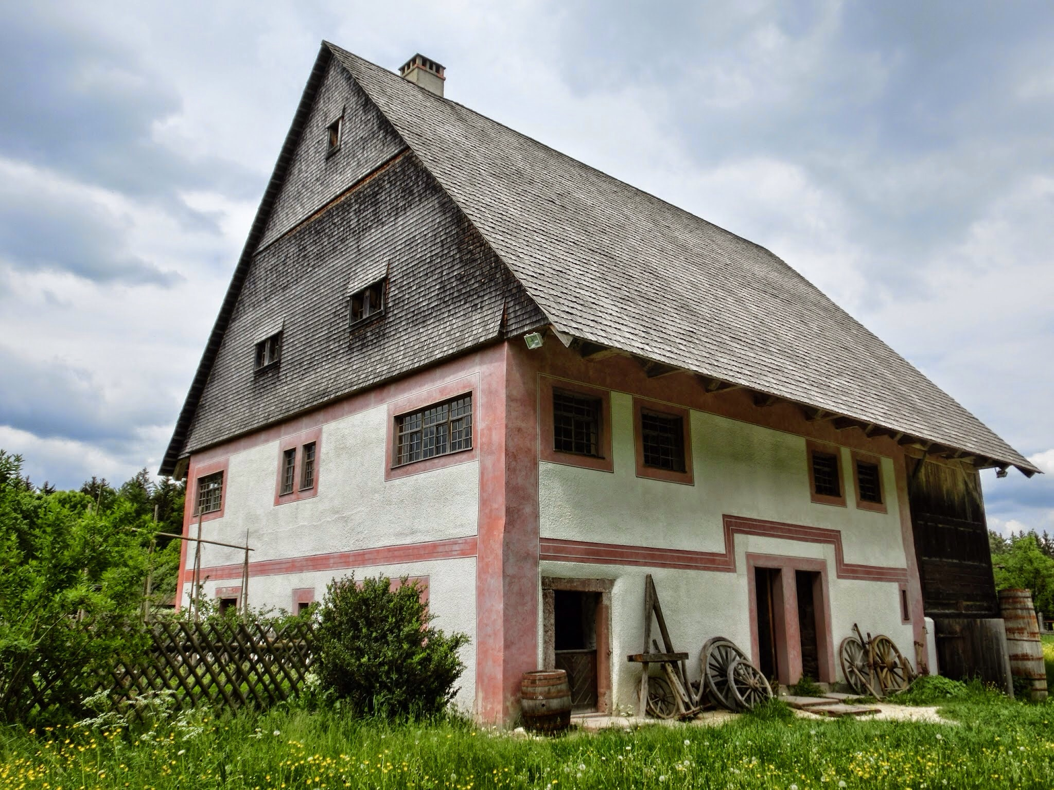 Deutschland - Baden-Württemberg - Landkreis Tuttlingen - Neuhausen ob Eck: Freilichtmuseum, Bauernhaus Mariazell